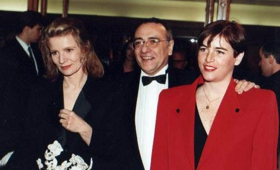 Yves Mourousi et son épouse, en compagnie de Nicole Garcia, lors de la 16e cérémonie des César.